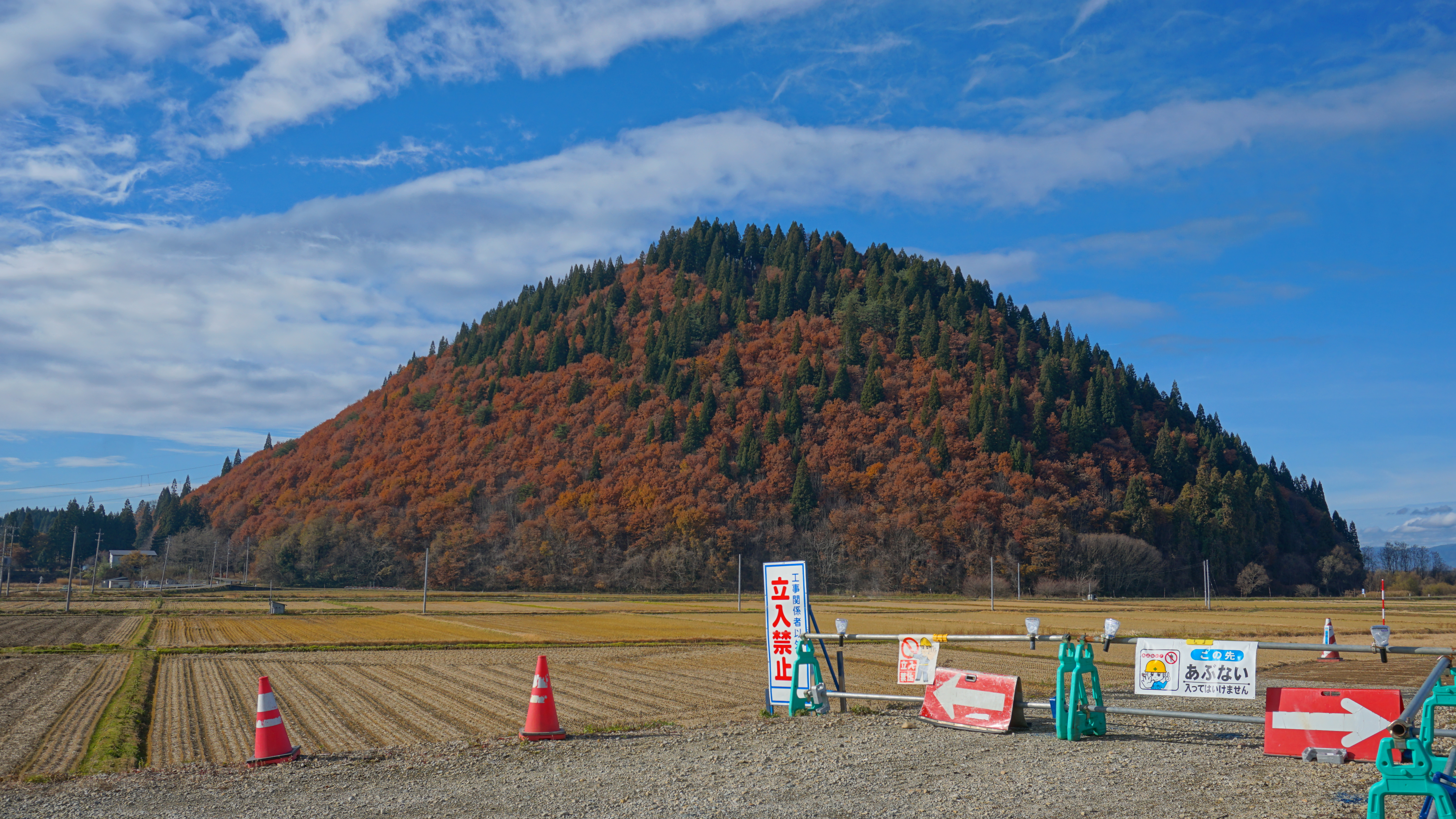 秋田県大館市比内町の中心域にある山、達子森